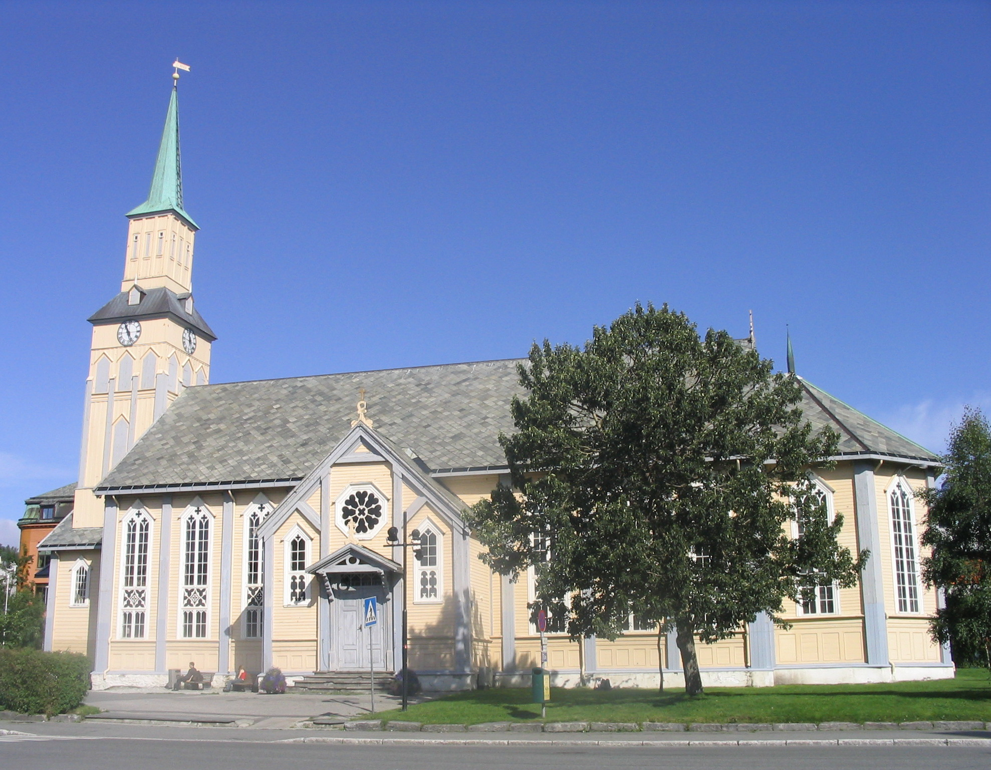 Tromsø Domkyrkje, Tromsø, Norway [2004]